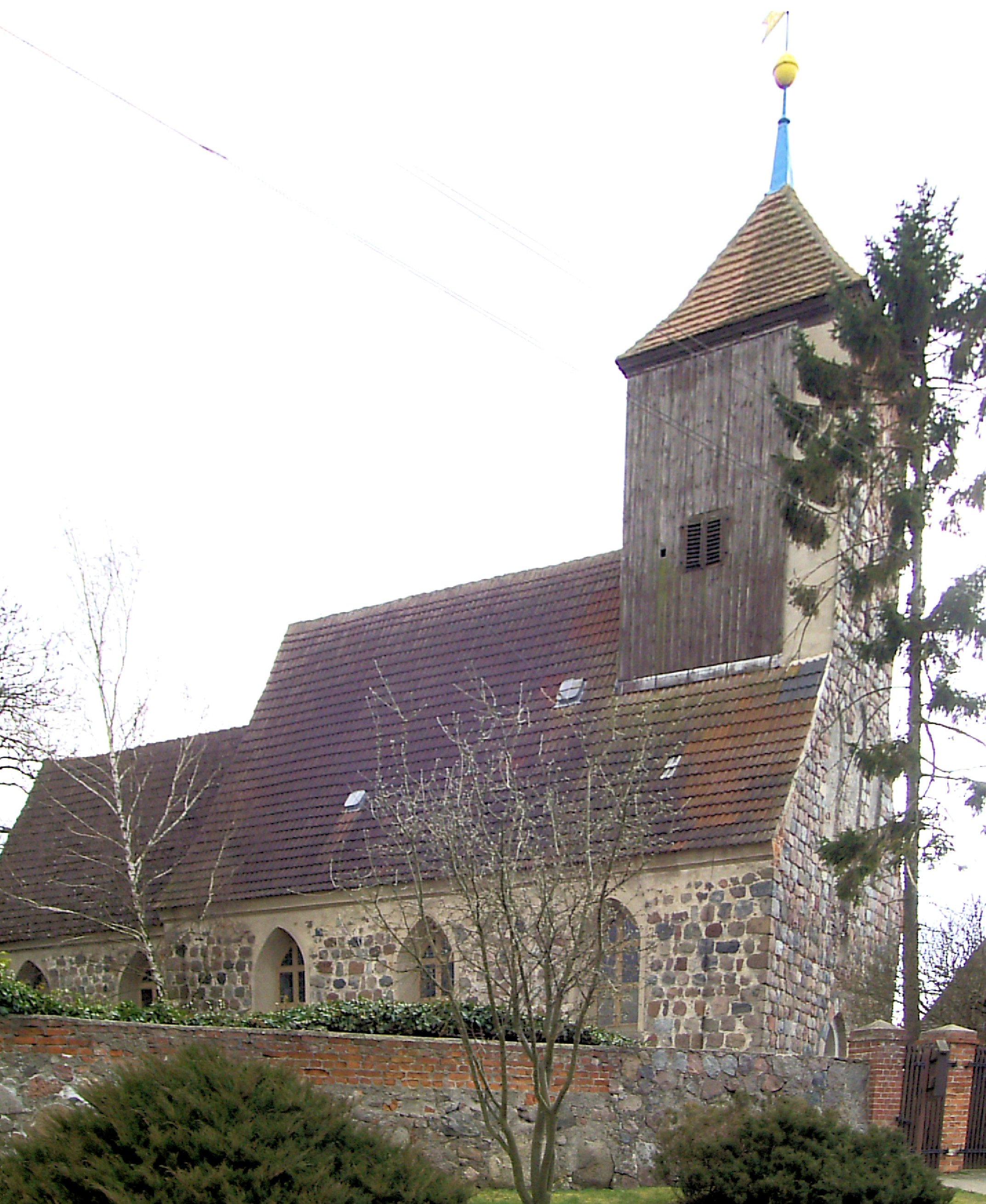 Kirche St. Marien im Zichower Ortsteil Fredersdorf